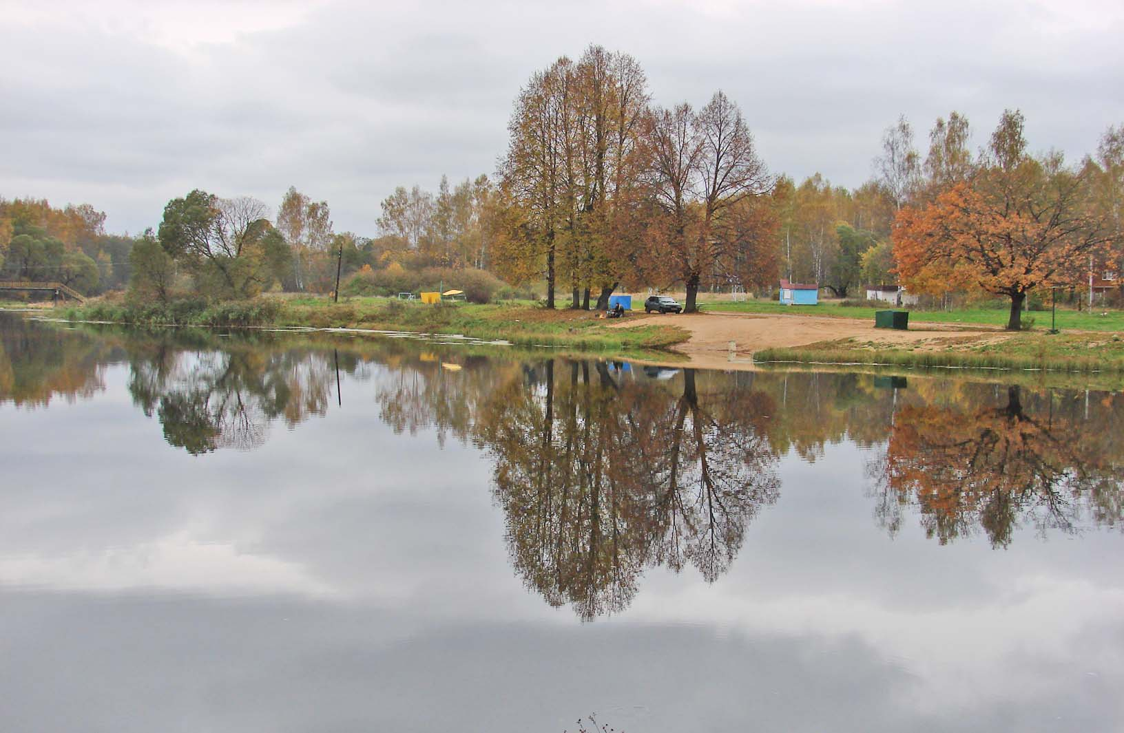 Озеро Дубровенка с массивом Красноборского лесопарка: в 0,5 км к западу от п. Дубровенка, в северо-восточной окраине лесопарка Крас­ный бор, Дубровенка, Смоленск, Смоленская область This image is related to the protected area of Russia number 6720142